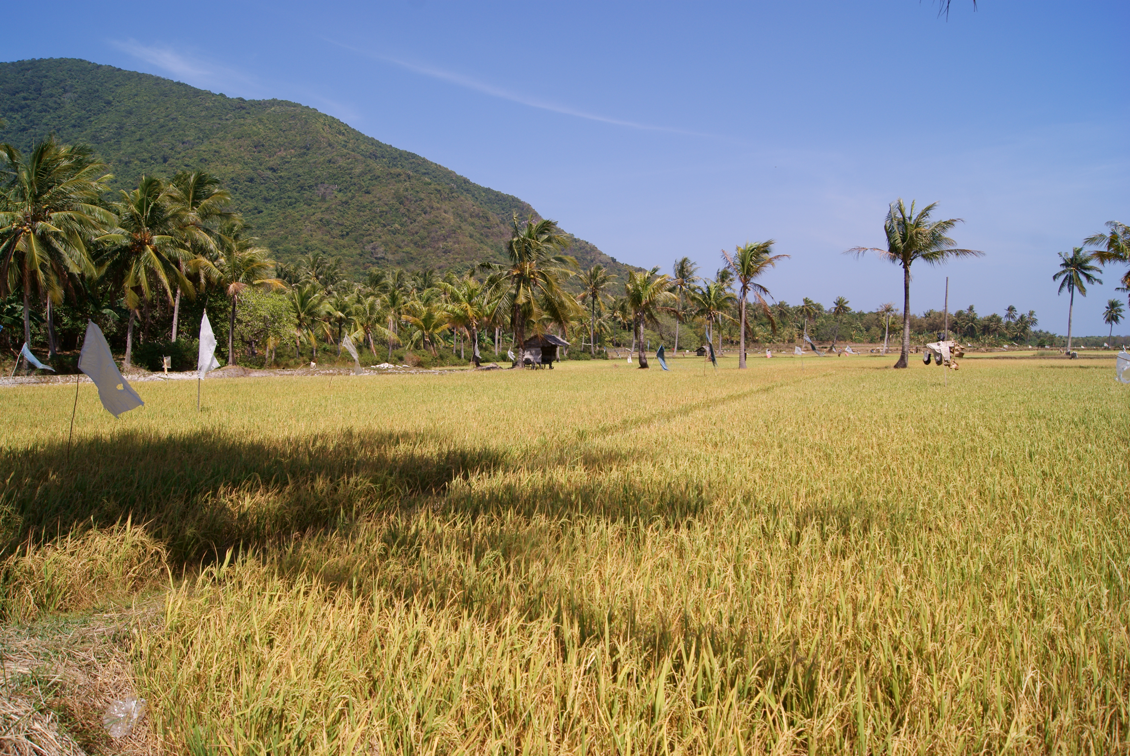 Satu-satunya persawahan di Pulau Karimun Jawa